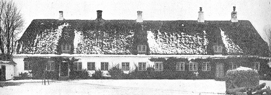 Nordenbrogård er en lille hovedgård, som er dannet i 1720 af 4 bøndergårde af grevskabet Langeland. Gården ligger i Magleby Sogn, Langelands Sønder Herred, Sydlangeland Kommune.